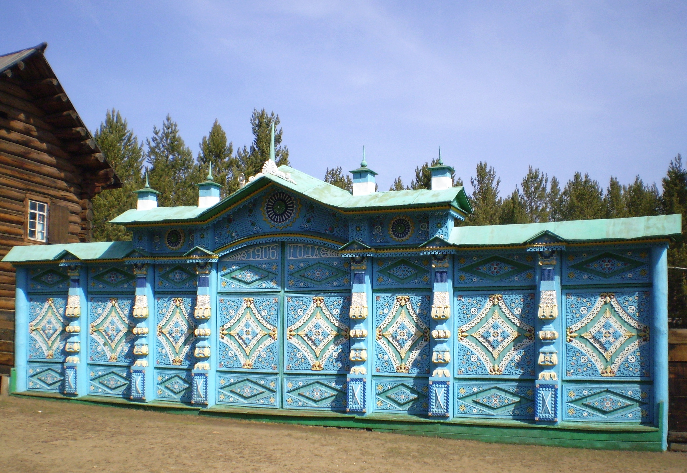 Ворота старообрядческого дома